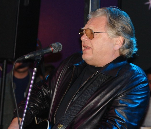 Выступление Юрия Антонова. Москва, 2006 г.